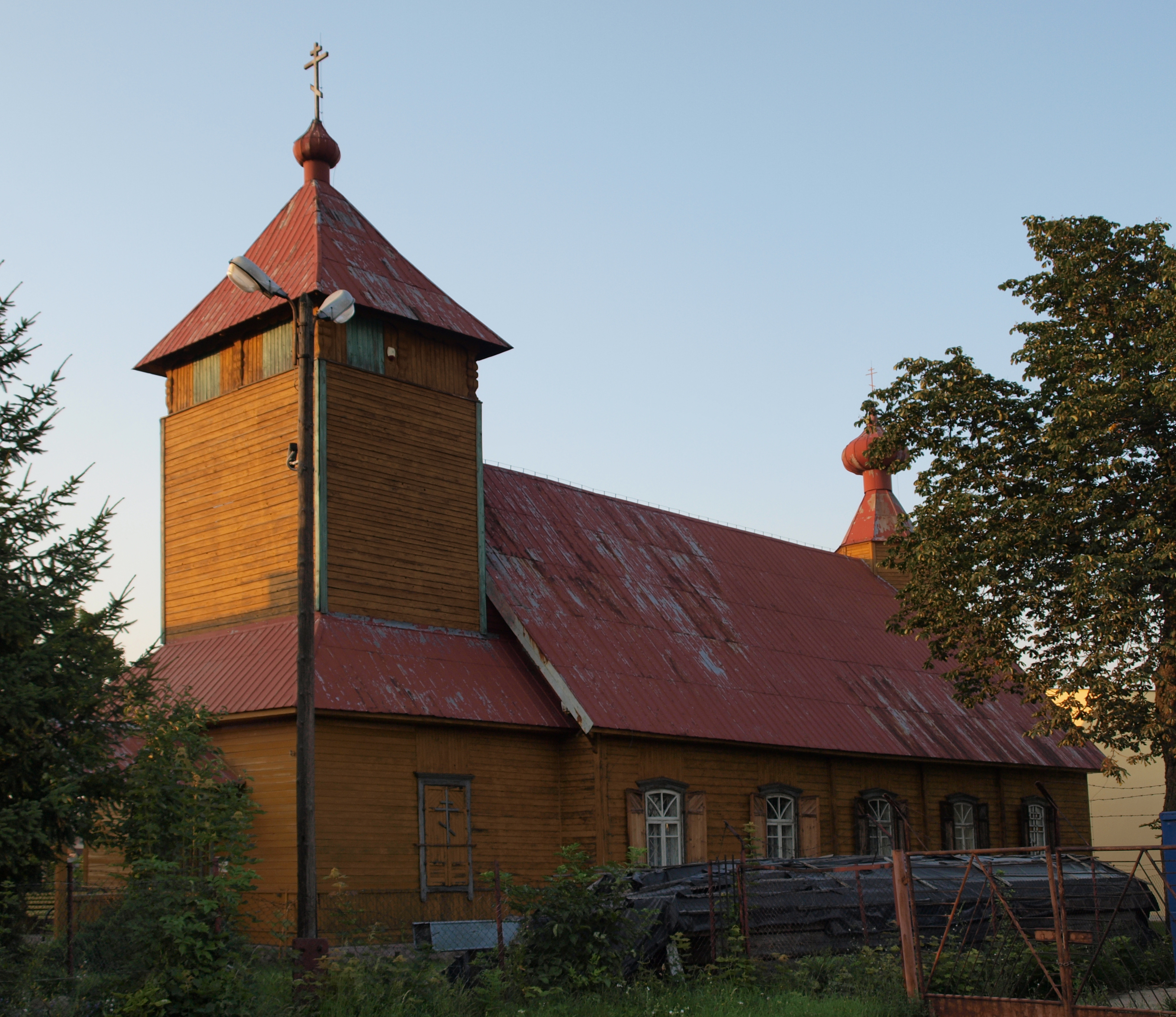 Molenna staroobrzędowców w Suwałkach Suwałki, ul. Sejneńska 05.1980.